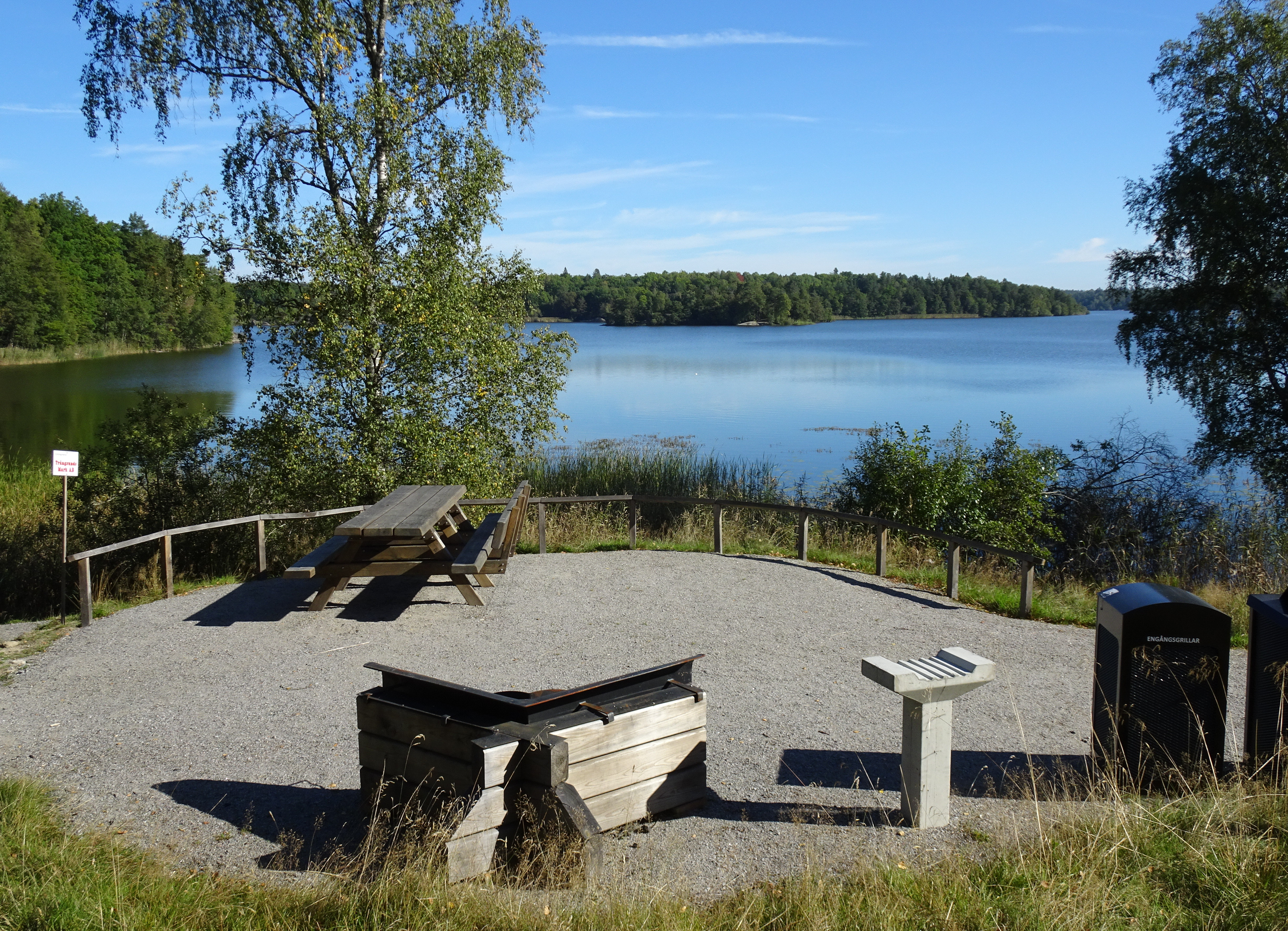 Ny vandringsled (Huddingeleden) vid Orlången, rastplats